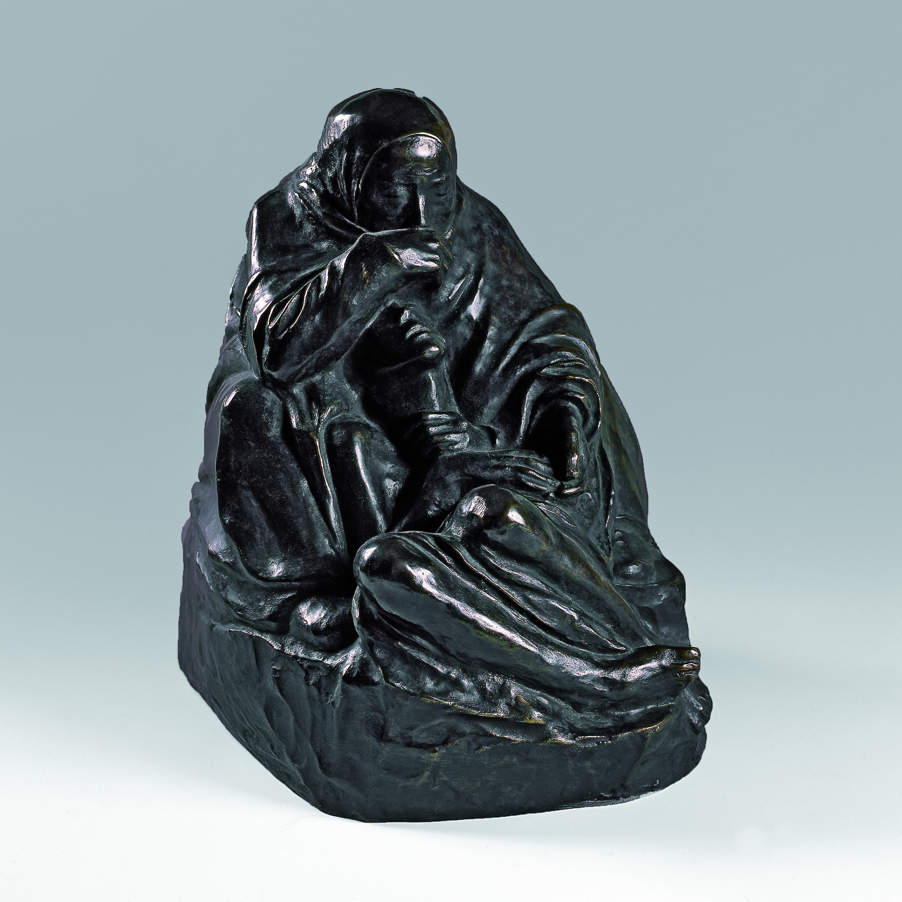 Käthe Kollwitz, Pietà, 1937